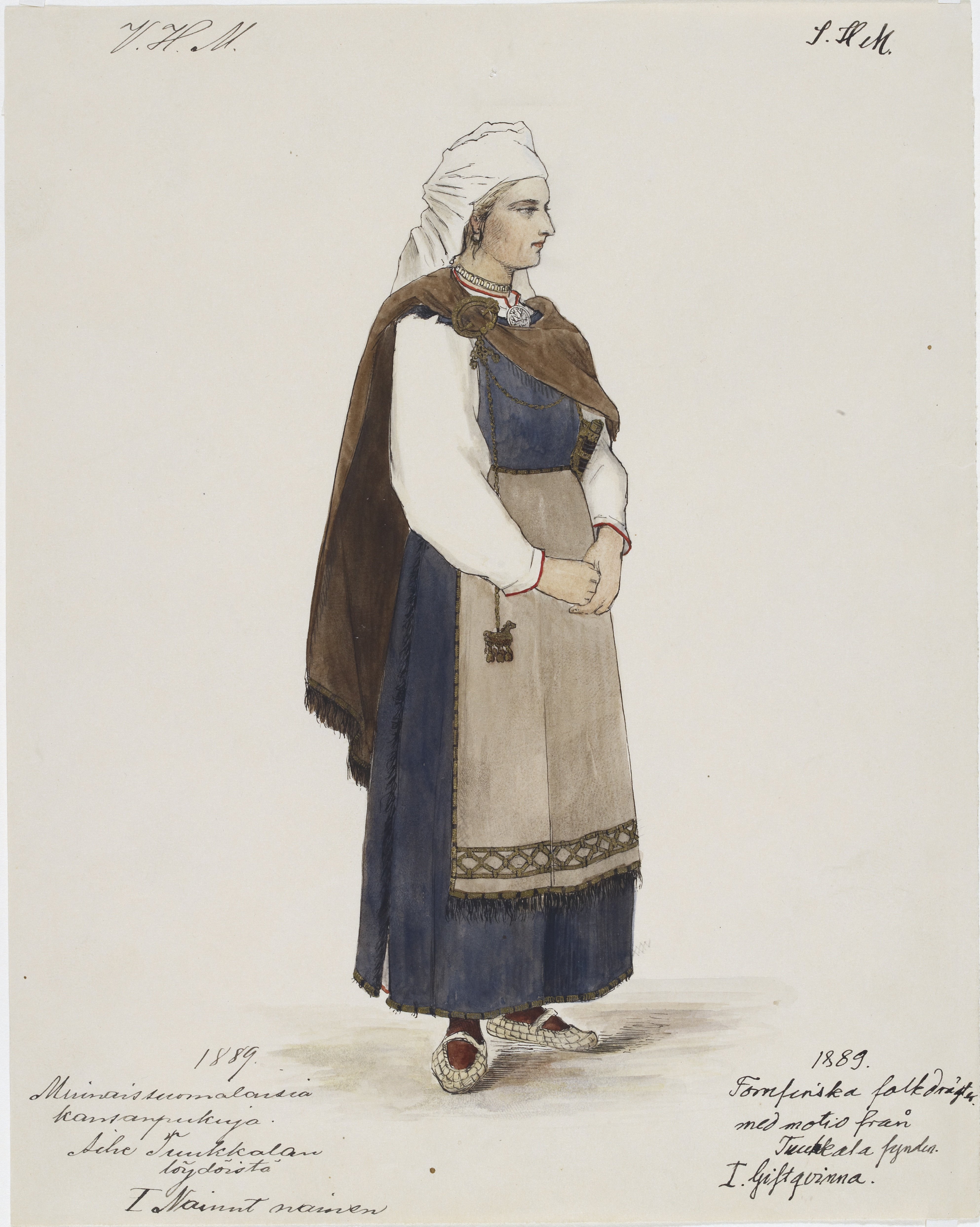 Naisen muinaispuku Mikkelin Tuukkalan löytöjen mukaan. Vuoden 1889 tulkinta.